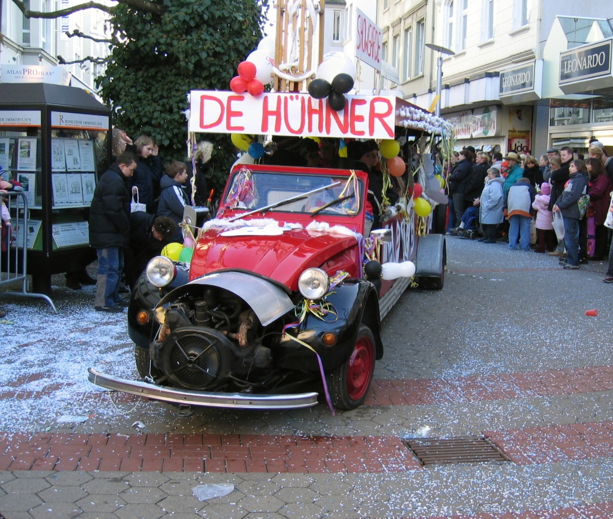 Description: Karnevalsumzug 2005 am Tulpensonntag durch die Innenstadt von Menden (Sauerland) Source: selbst fotografiert Date: 6. Feb. 2005 Author: Asio otus